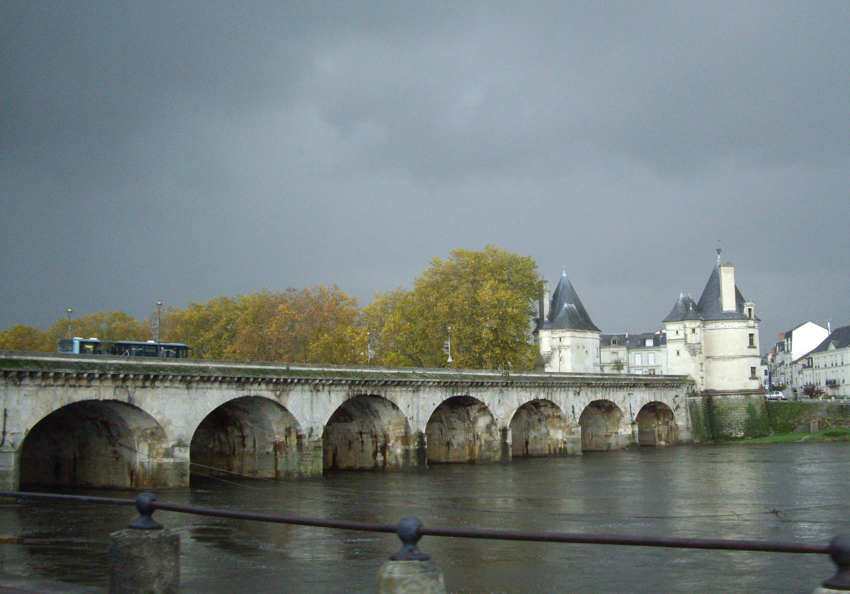 Le pont Henri-IV - Vue générale depuis la rive Est au Nord du pont, avec les deux tours au fond.